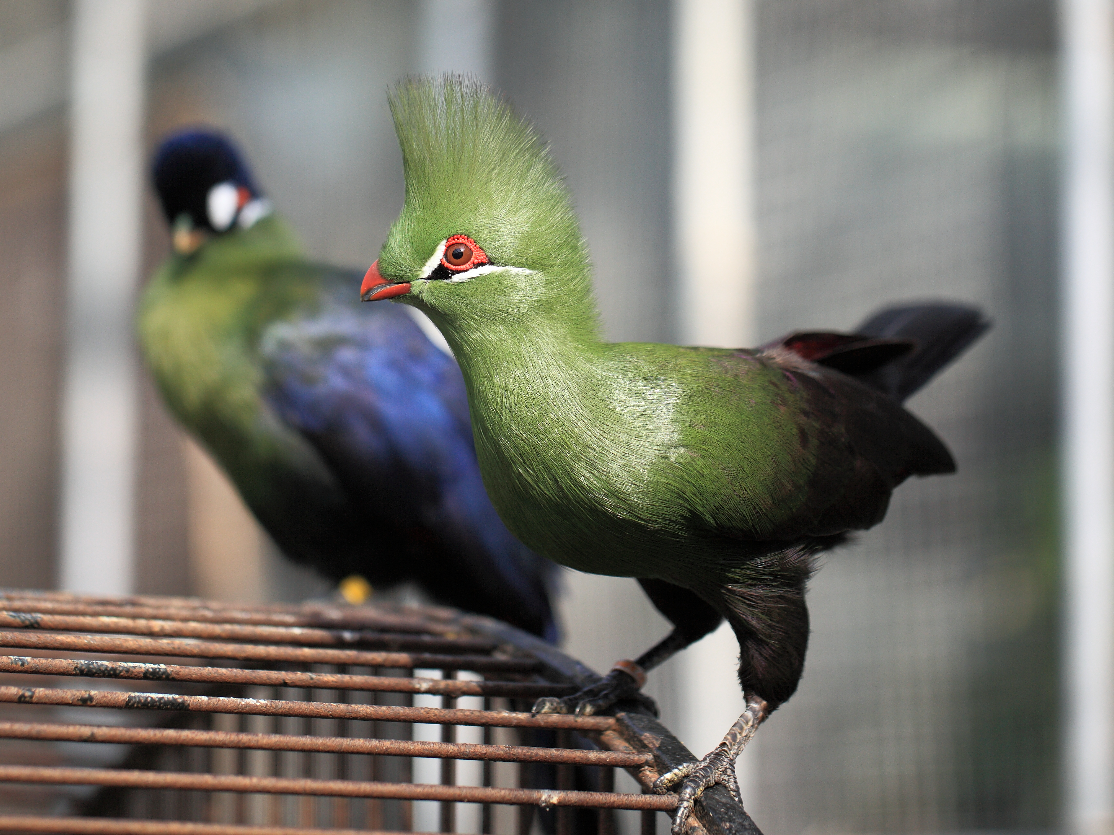 Kakegawa Kacho-en , Kakegawa-shi(city) Shizuoka-ken(Prefecture), Japan 静岡県掛川市(しずおかけん かけがわし) 掛川花鳥園(かけがわかちょうえん)